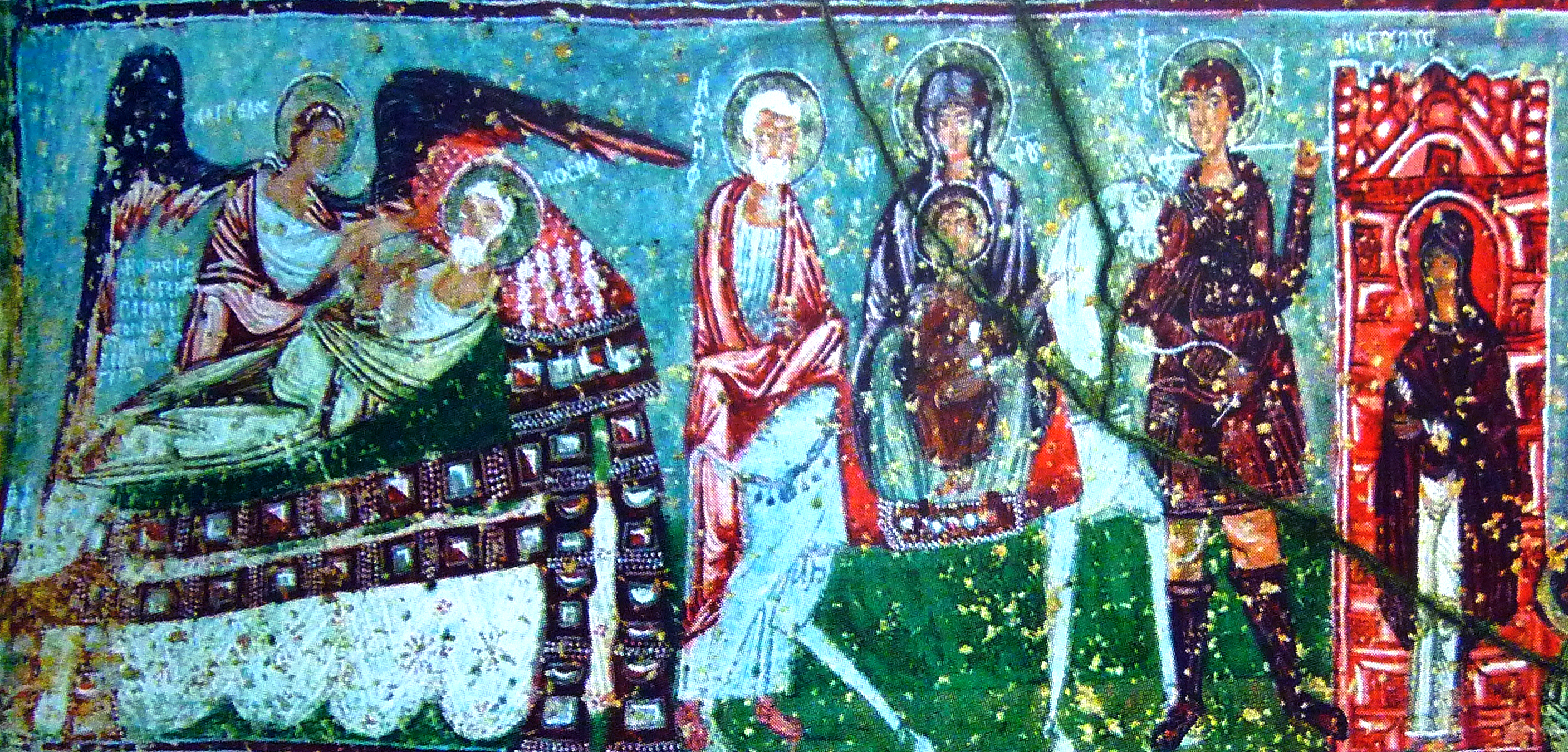 Kappadókia/Göreme Nemzeti Park: Cavusin-sziklatemplom freskója